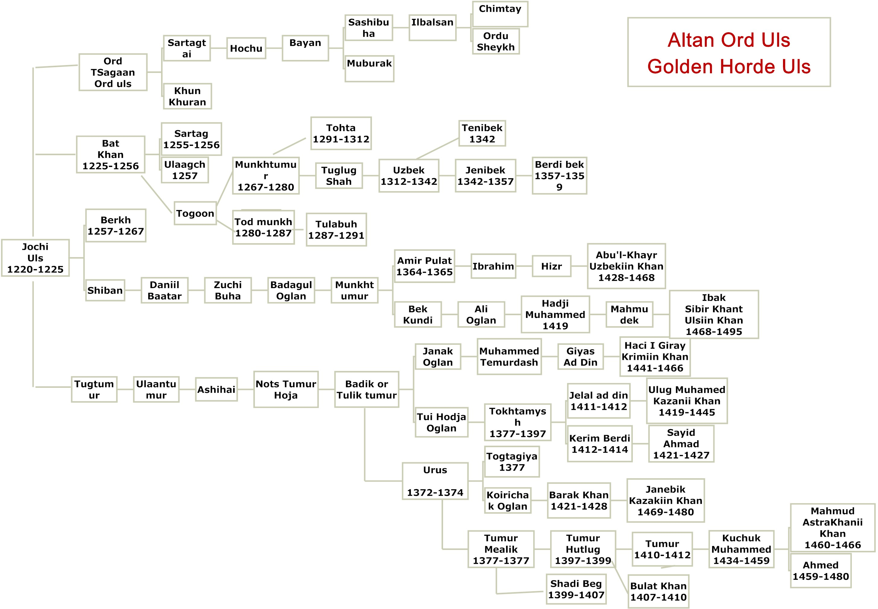 Монгол: Алтан Ордны Улс